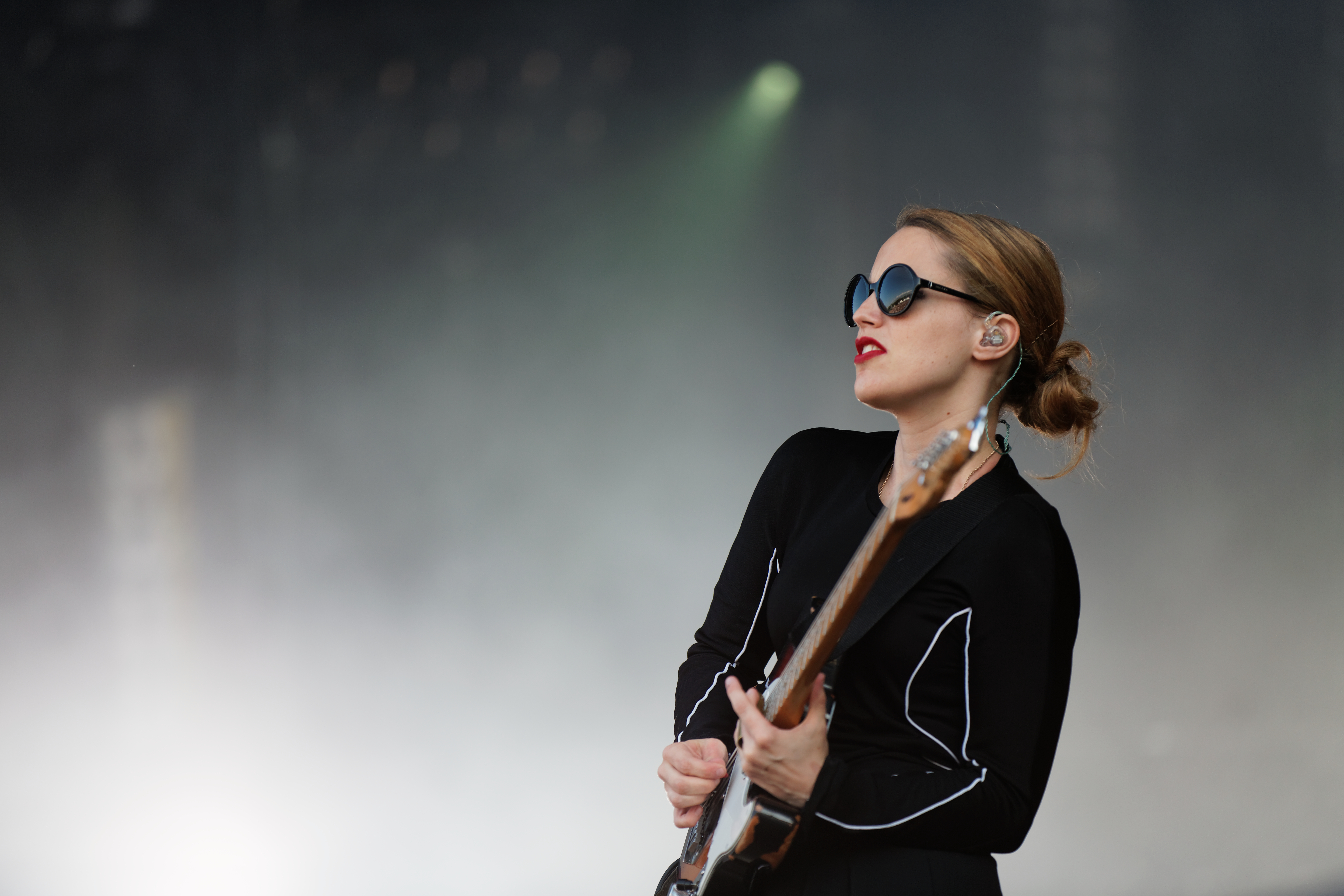 Le festival des vieilles charrues 2015.